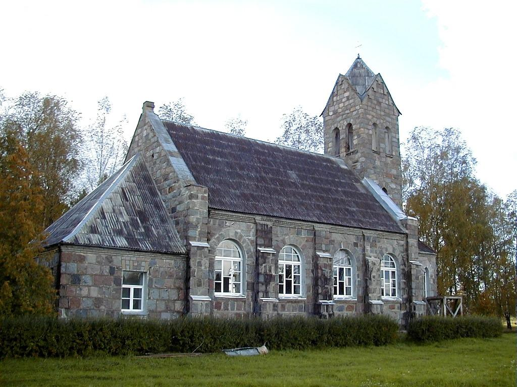 Liepnas baznīca 2000-09-14